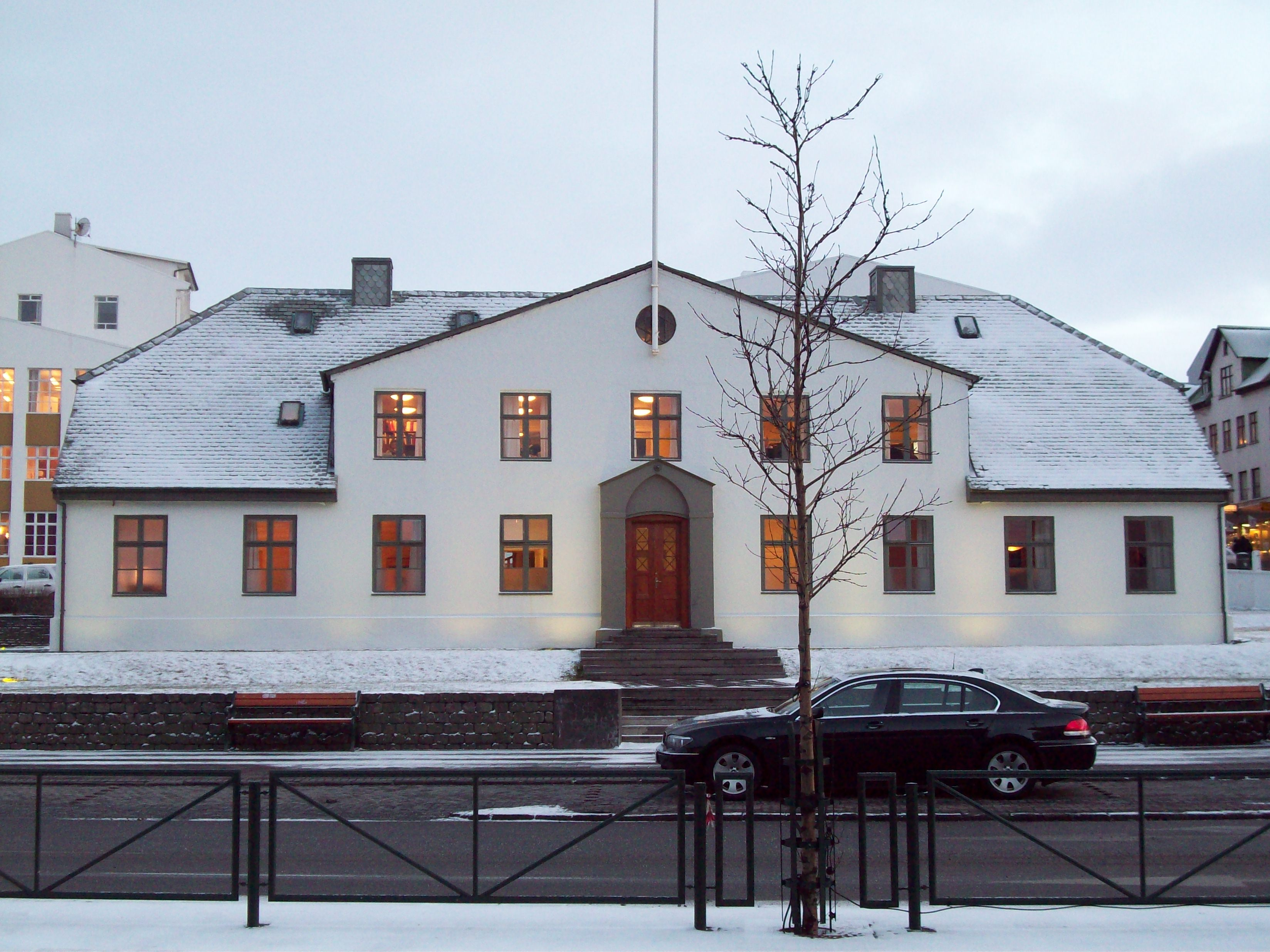 Stjórnarráðshúsið